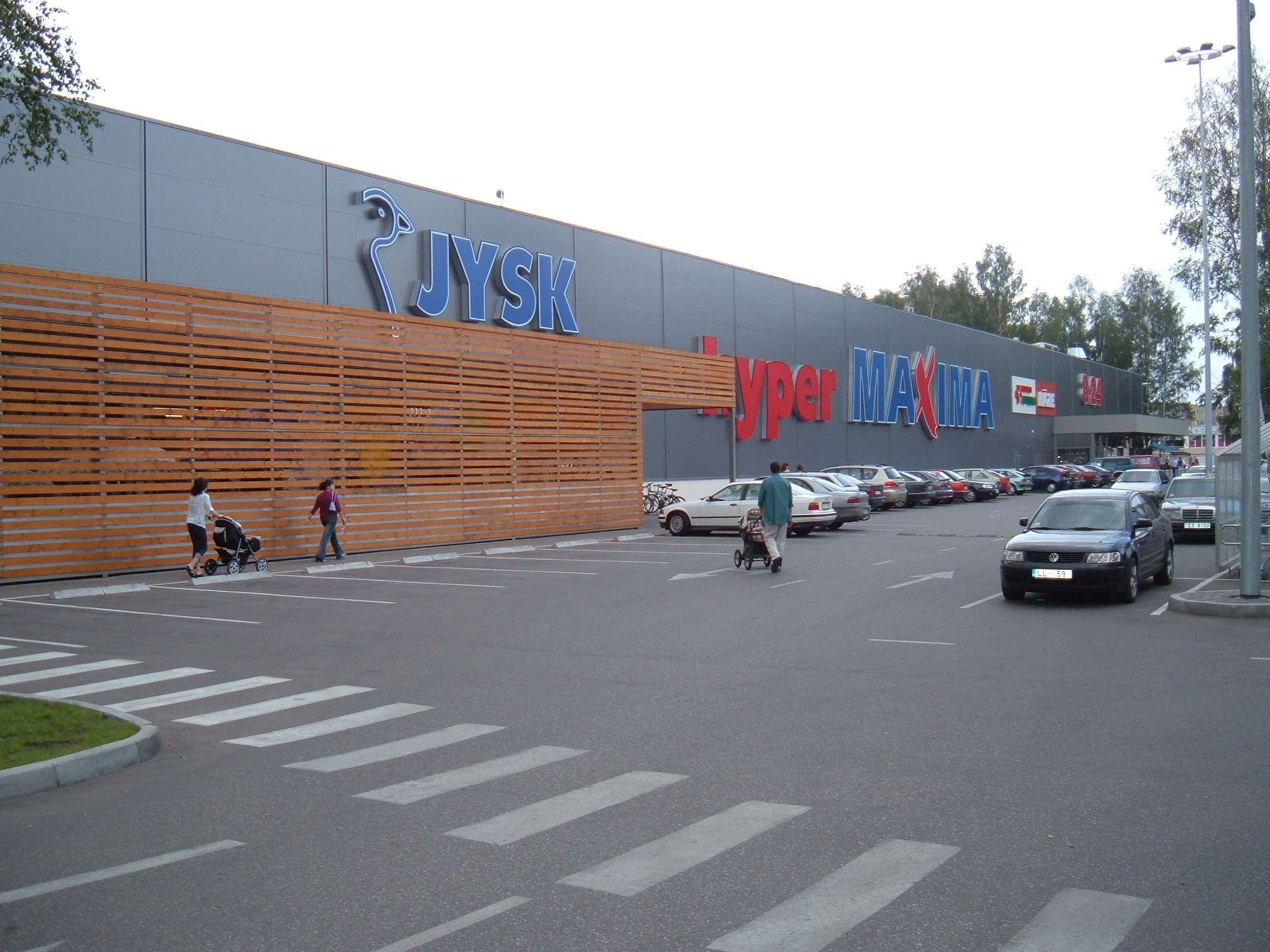 Maxima mall